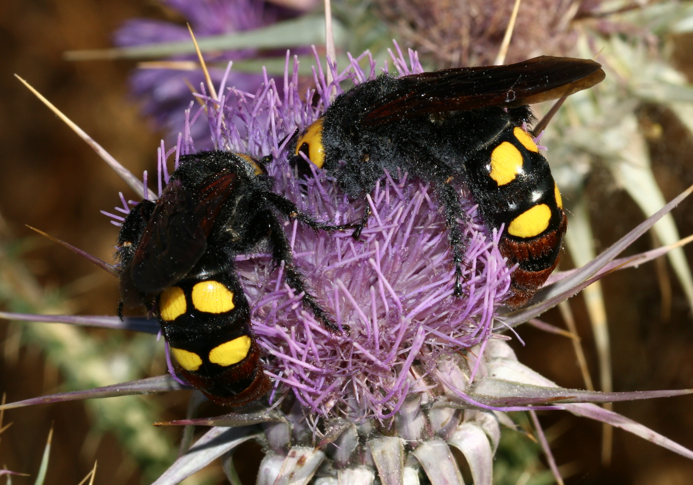 Argaka, Cyprus